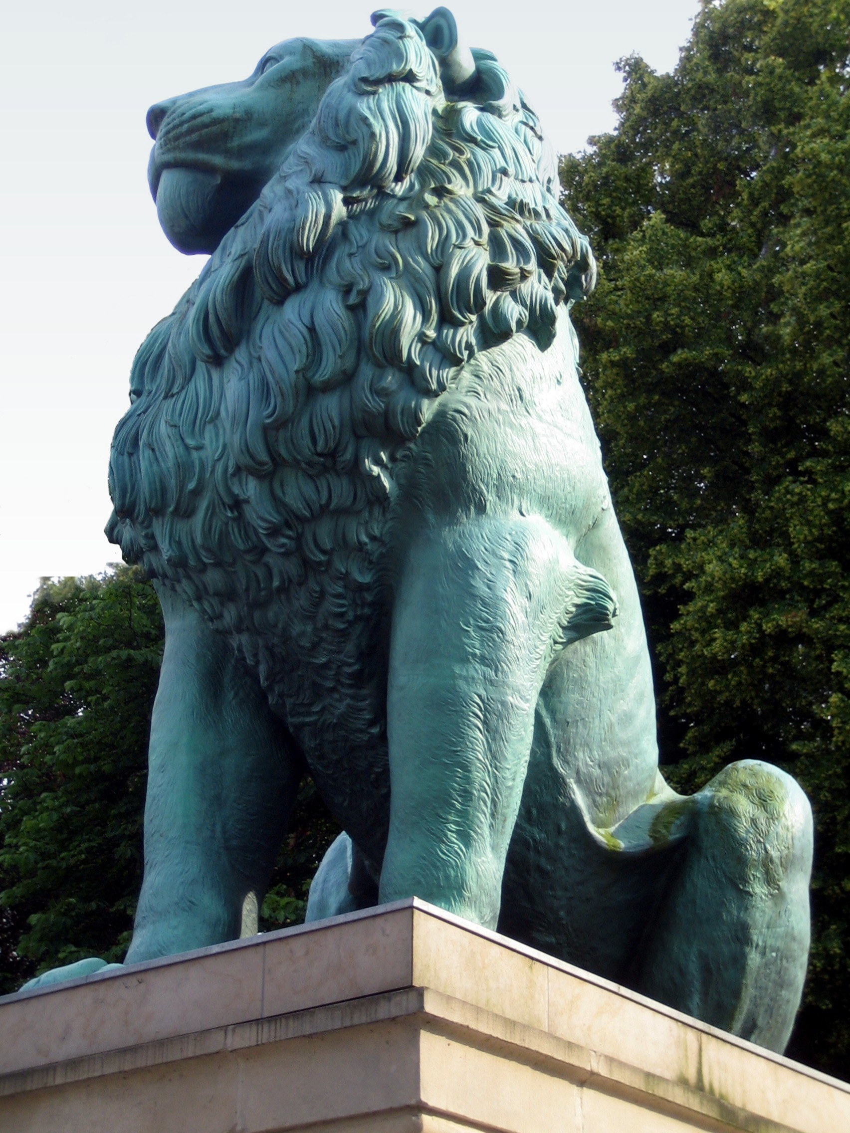 Skulptur "Flensburger Löwe" von Herman V. Bissen am Heckeshorn in Berlin-Wannsee.